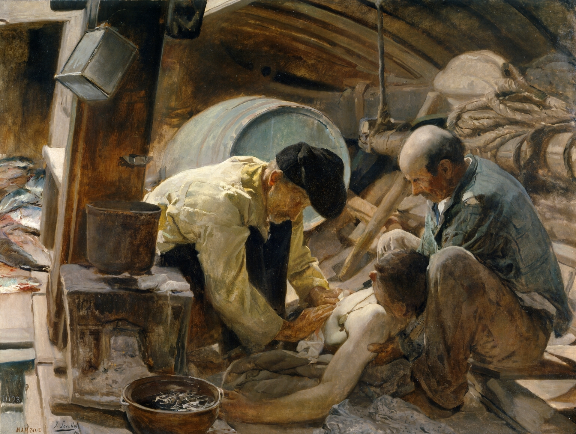 Joaquin Soralla'nın 1894 yılında yaptığı tablosu 1895 yılında altın madalya kazandı ve tablo İspanya Devleti tarafından satın alındı.